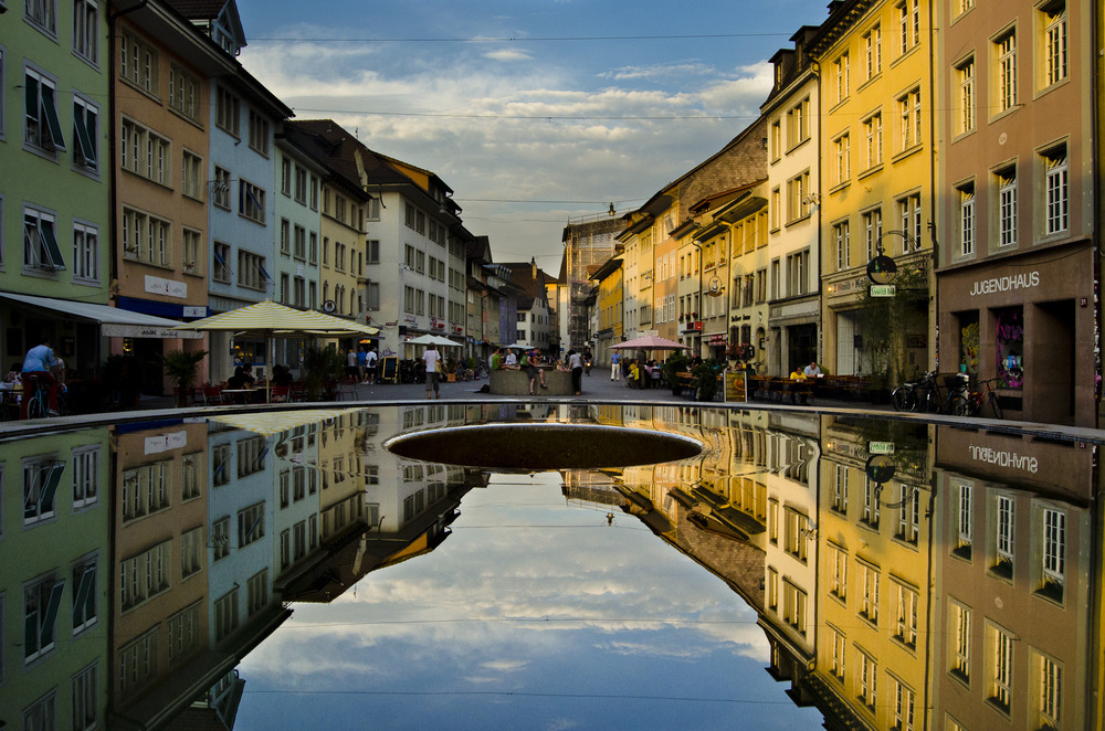 Spiegelung der Steinberggasse in einem der drei Judd-Brunnen in Winterthur